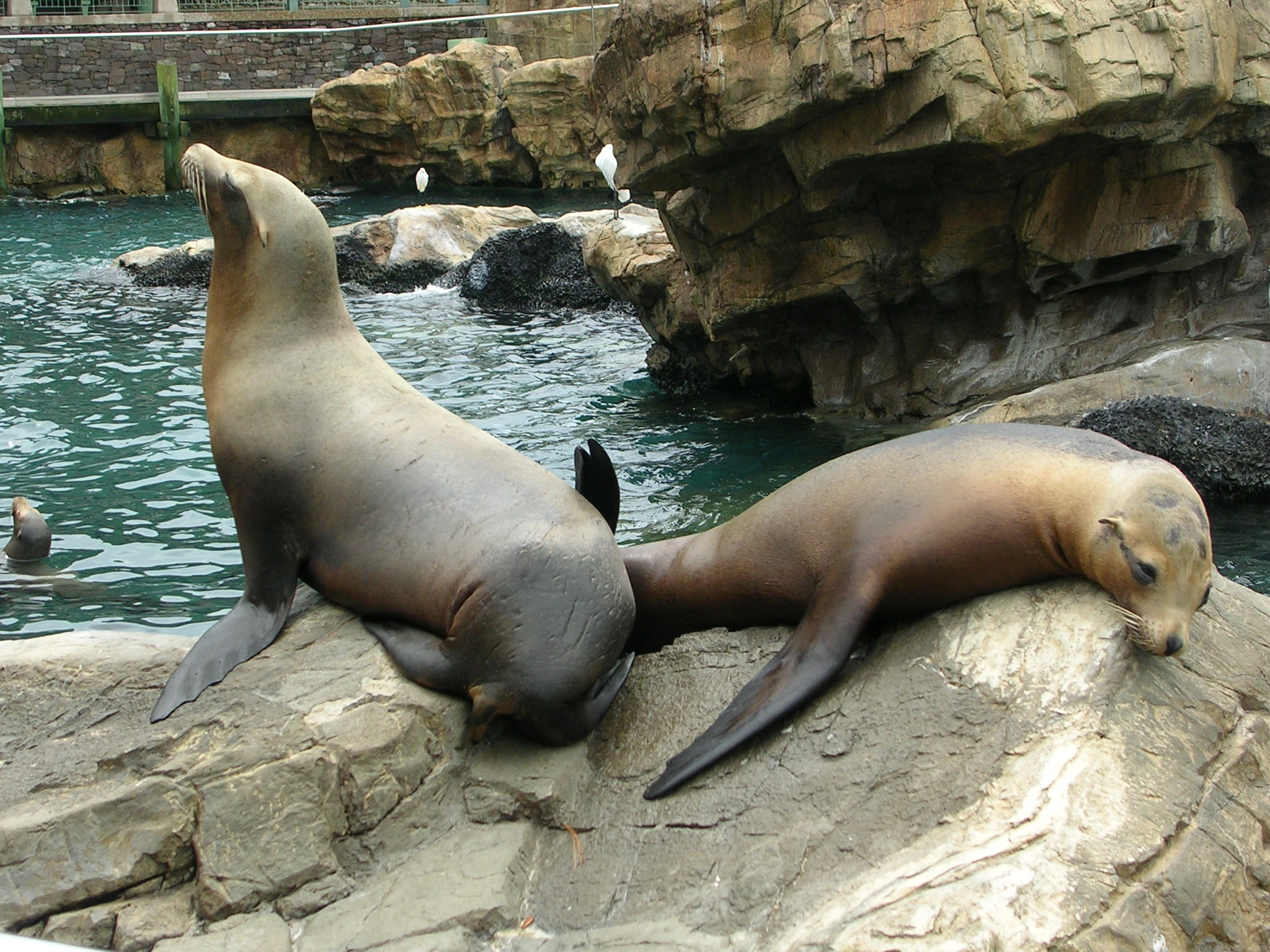 Sealions at Orlando, Florida